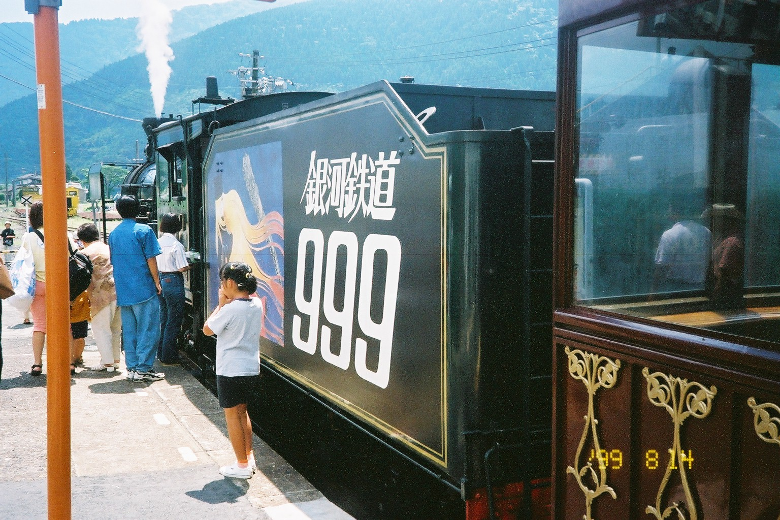 SLあそBOY号。1999年に行われた「銀河鉄道999号」とのタイアップイベント時のもの。